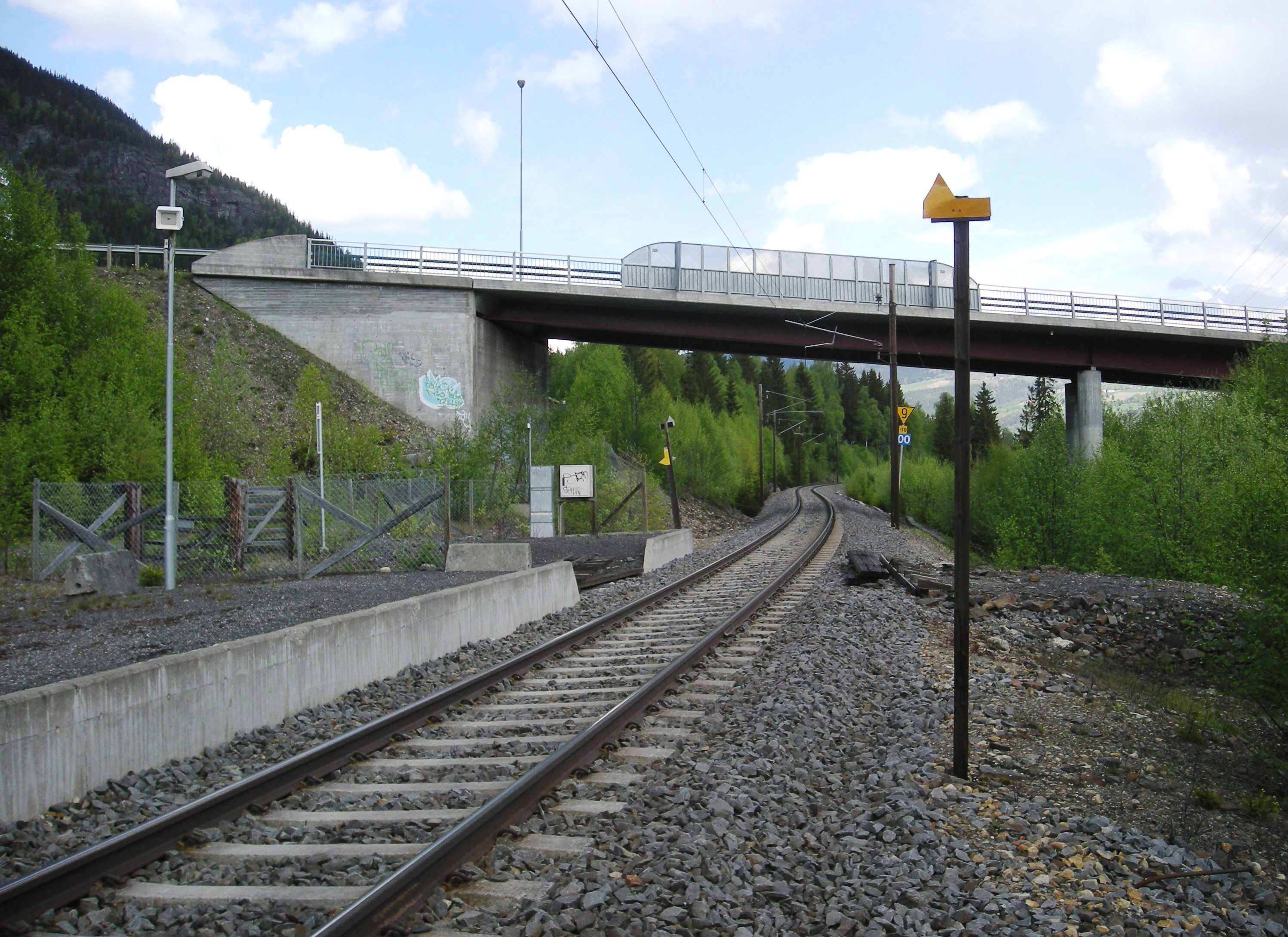 Fylkesvei 319 krysser Lågen og Dovrebanen på Granrudmoen bru.